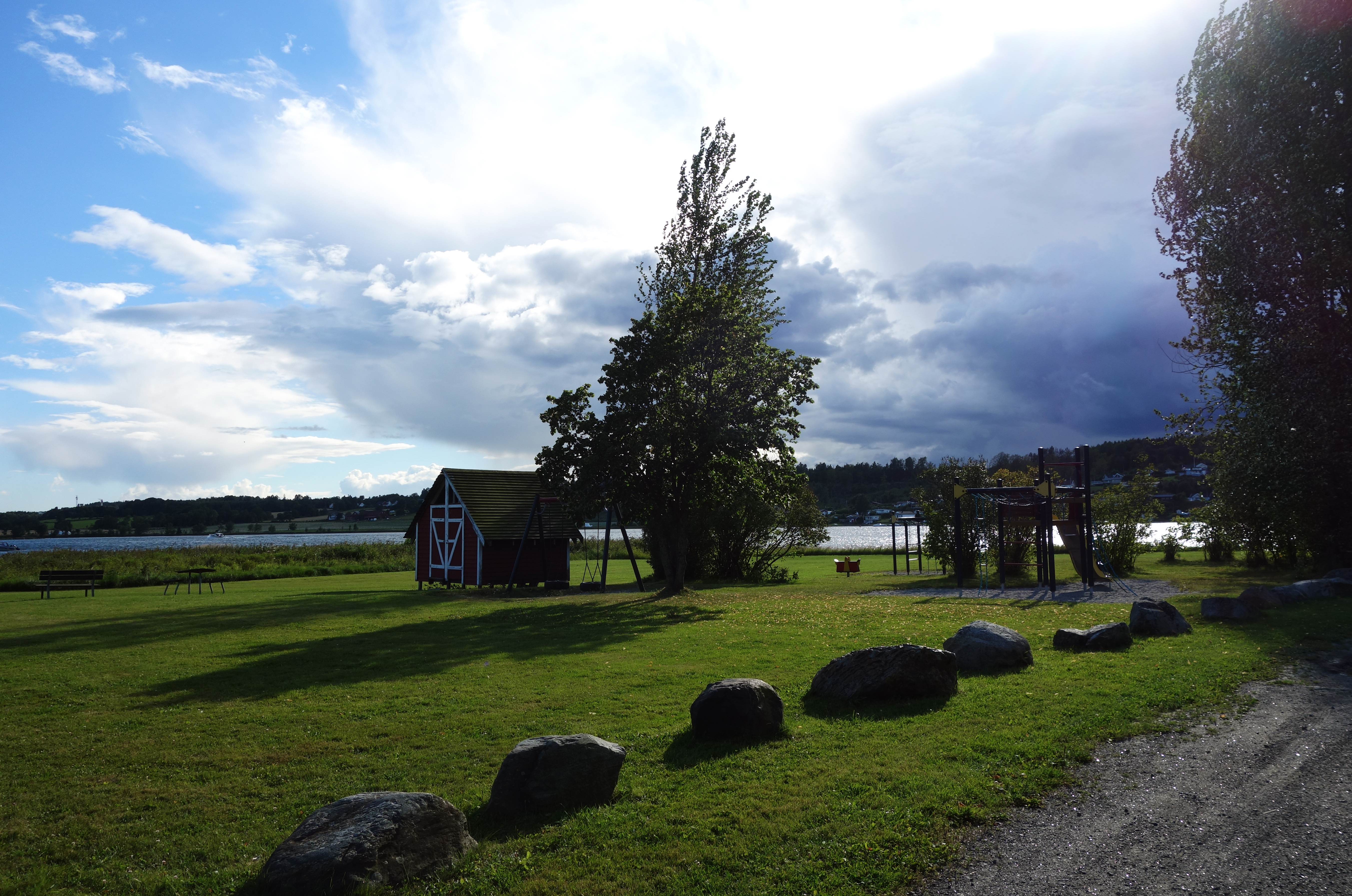 Munkholmen på Nøtterøy